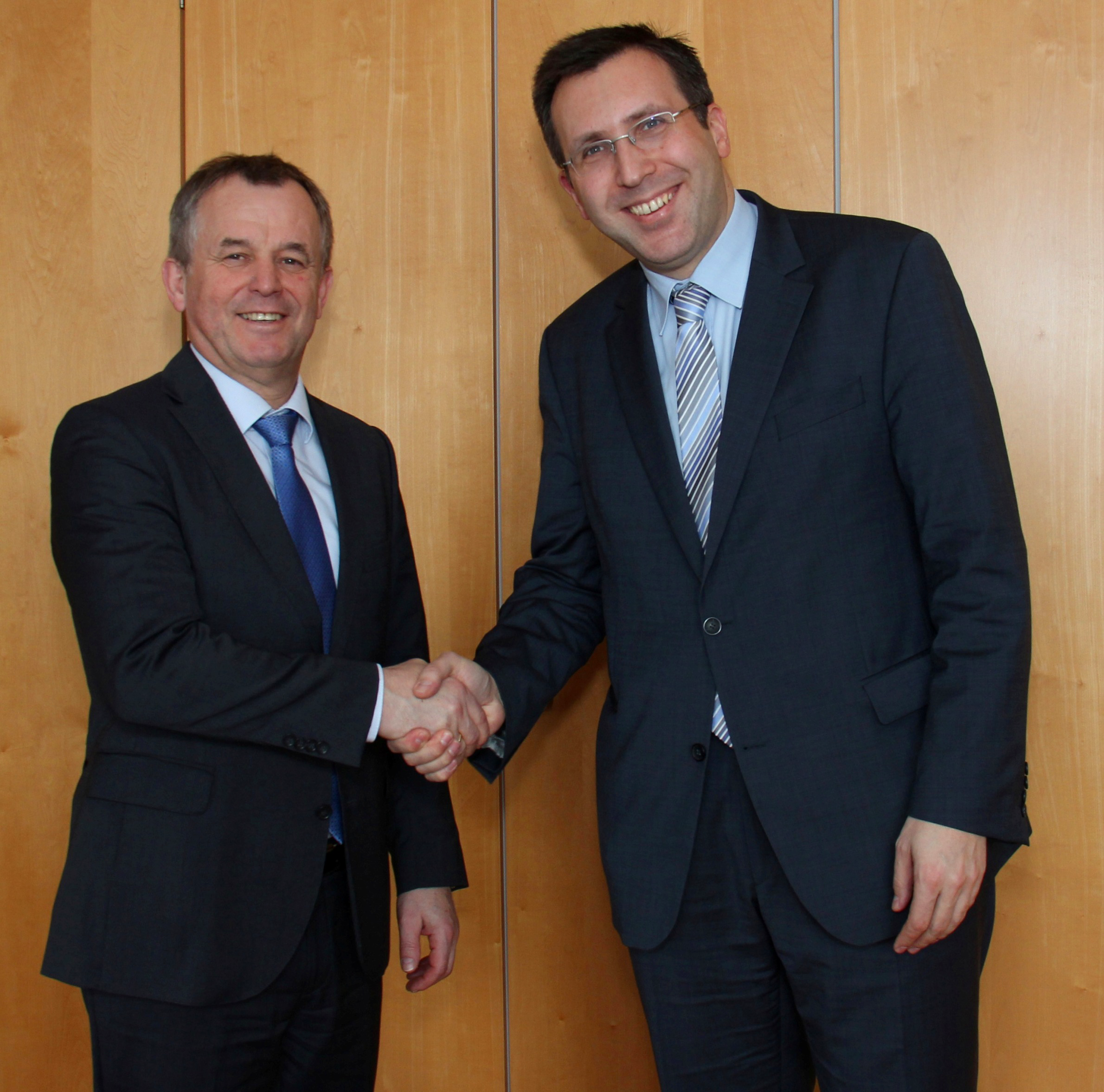 Polizeivizepräsident Walter Seubert wird ins Amt eingeführt Aufnahme im Polizeipräsidium Frankfurt am Main vom 03.02.2015